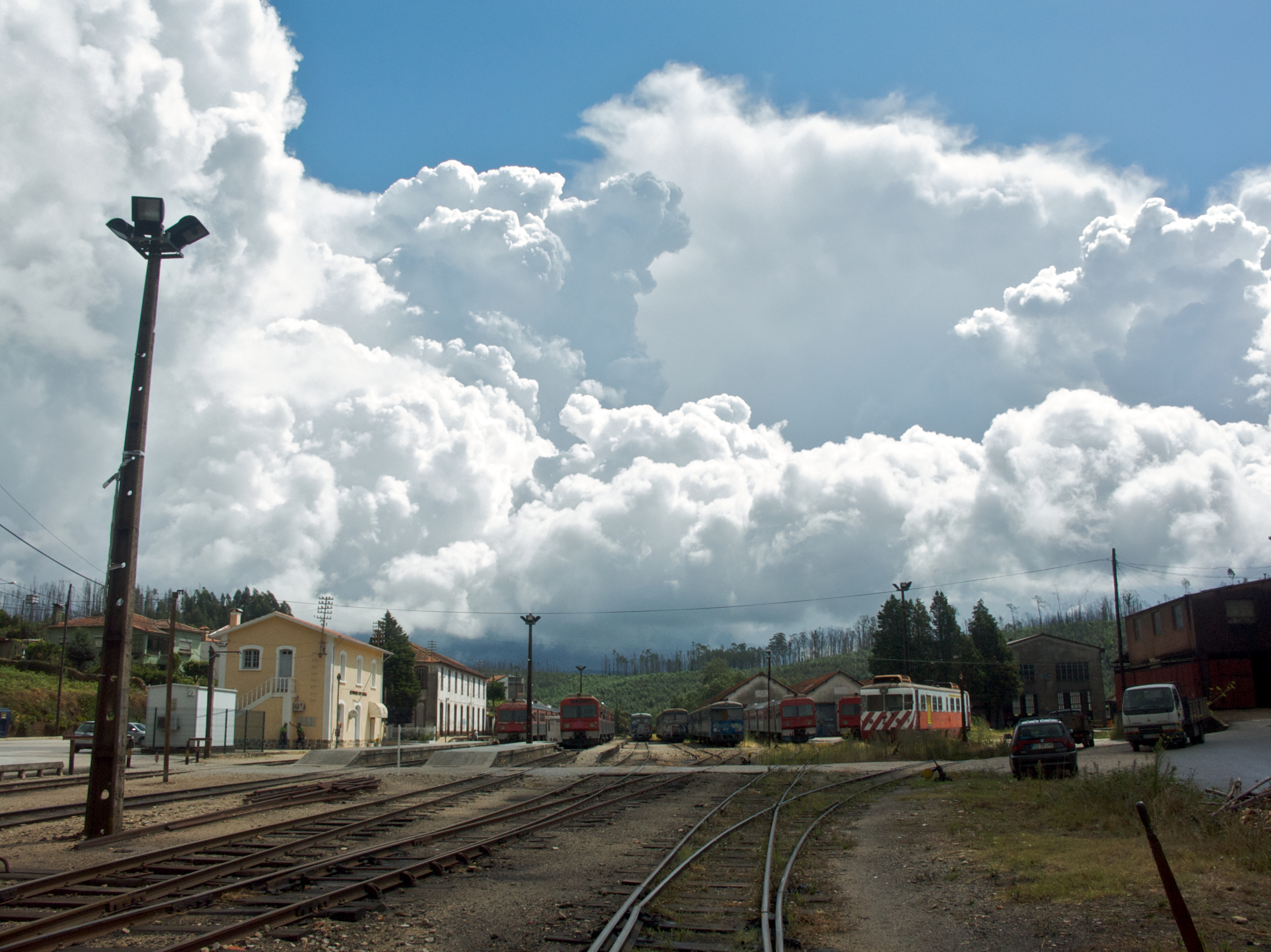 Tipo: E [Estação] Local: Sernada do Vouga [Linha do Vouga, PK 61] Data e hora: 18 de Agosto de 2006 [11h45]